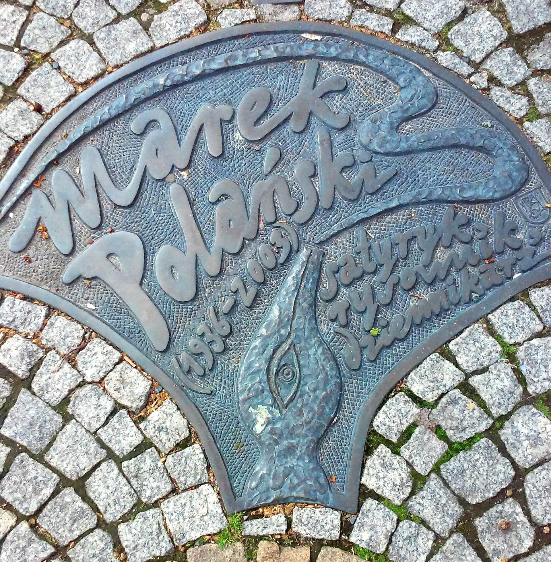 Legnica, Aleja Gwiazd Satyrykonu, tablica pamiątkowa - Marek Polański